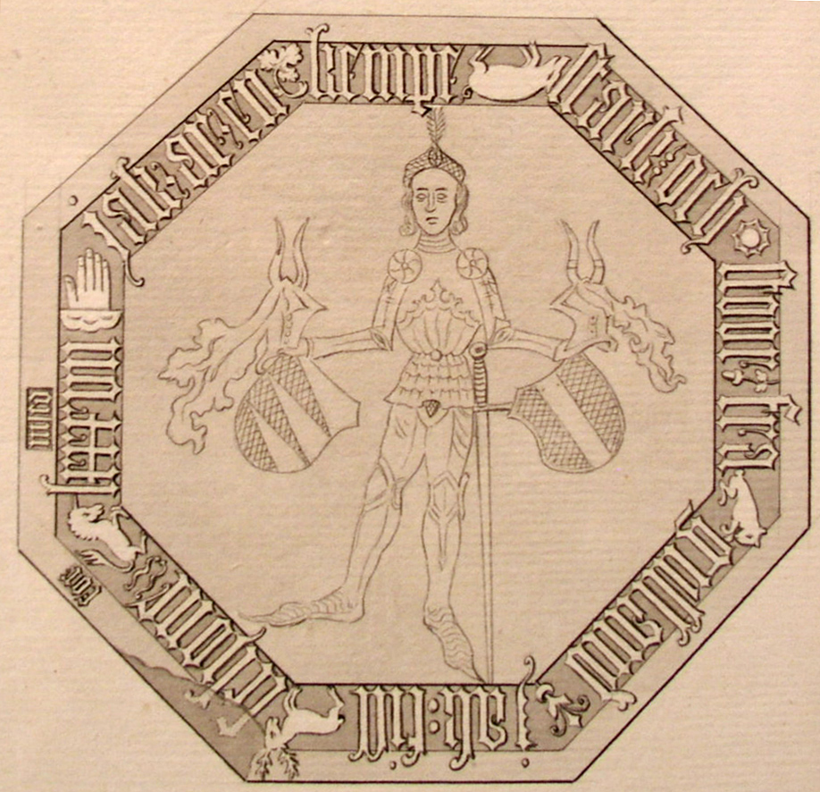 Jens Holgersen Ulfstand the builder of Glimmingehus, Sweden, is shown in this picture. The photo was taken in Glimmingehus on a paper shown in a temporary exhibition the 8th of August 2005 by Håkan Svensson (Xauxa). sv: Bilden visar den oregelbundna åttakantiga stenen på Glimmingehus som avbildar byggherren Jens Holgersen Ulfstand, så som den avbildades av Carl Gustav Gottfried Hilfeling, cirka 1775. Texten lyder: ” Jag är en kämpe, stark och stor, från Gulland (Gotland) jag till Skåne for.” Stenen är ingjuten i väggen på andra våningen.